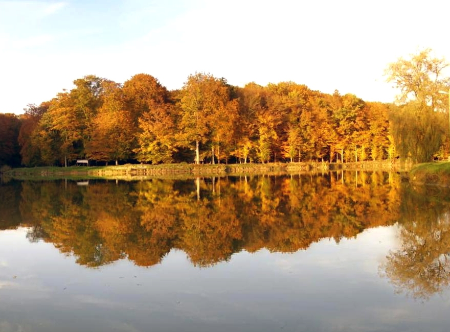 Popular excursion site near Grubišno Polje.